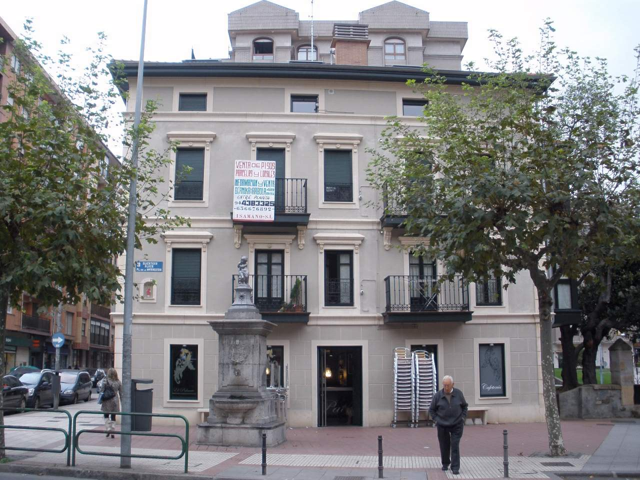 Plaza de la Anteiglesia (Barakaldo)